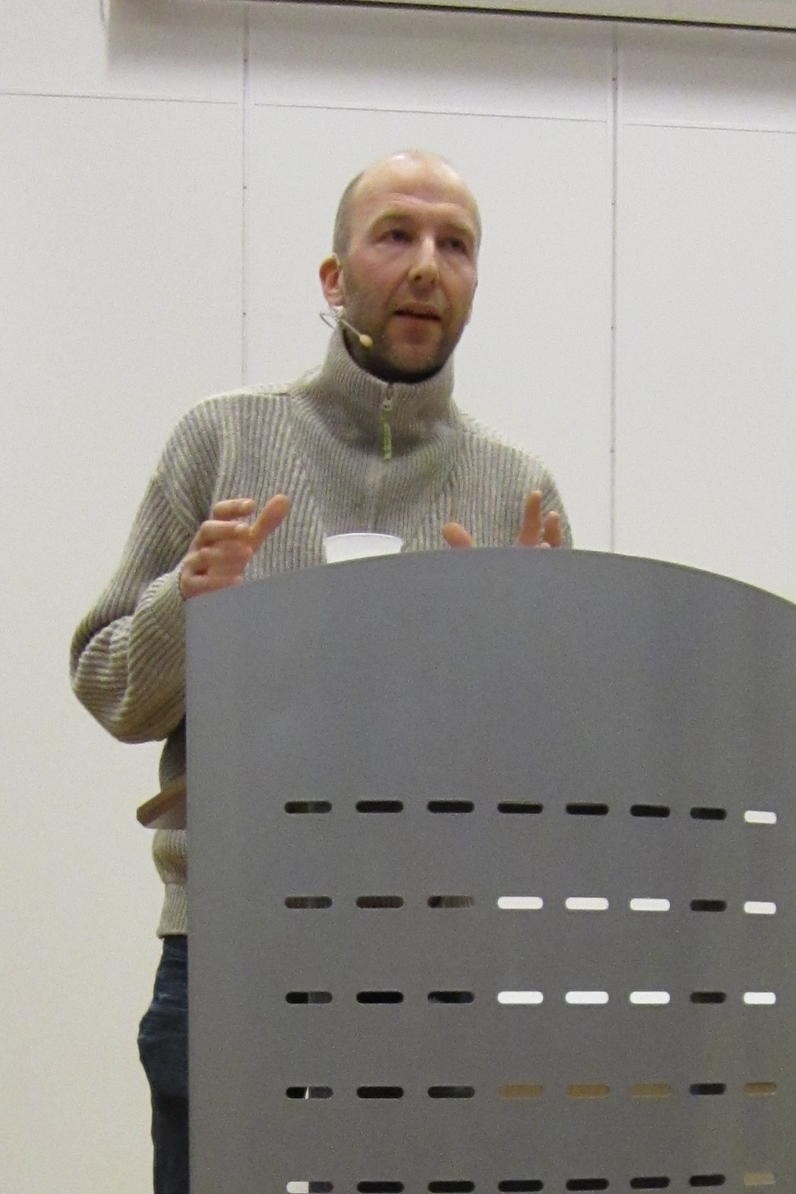 Alfred Fidjestøl holder foredrag på Garborgsenteret. Fotograf: Ørjan Johansen, Garborgsenteret.